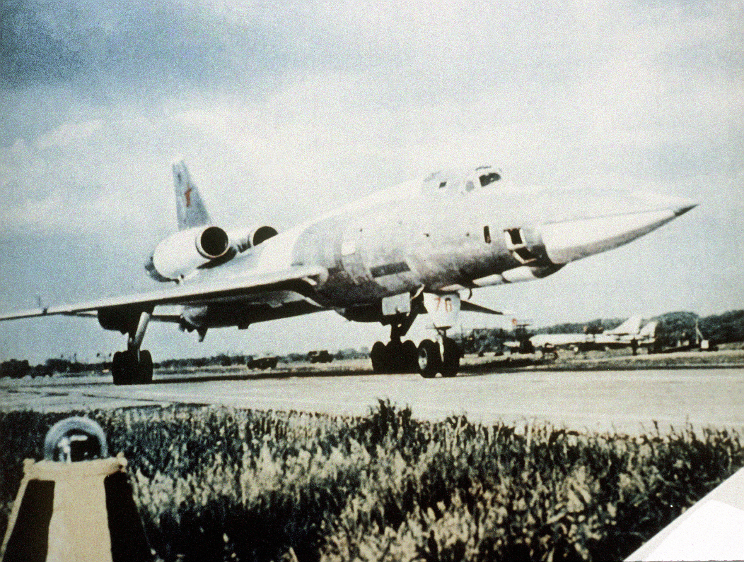 A parked Soviet Tuploev Tu-22 "Blinder" aircraft.